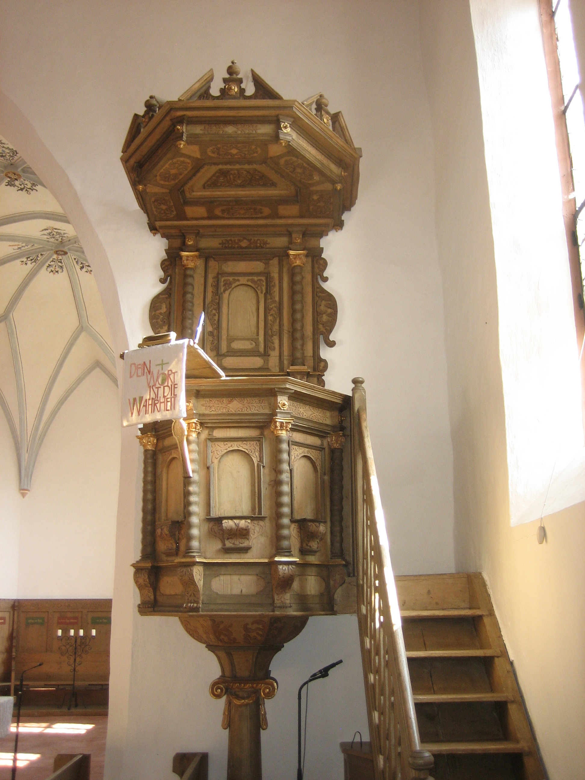 Ev. Ref. Pfarrkirche Theinselberg, Gemeinde Lachen, Landkreis Unterallgäu, Bayern